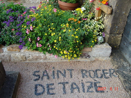 Roger atya sírja Taizéban, Franciaország